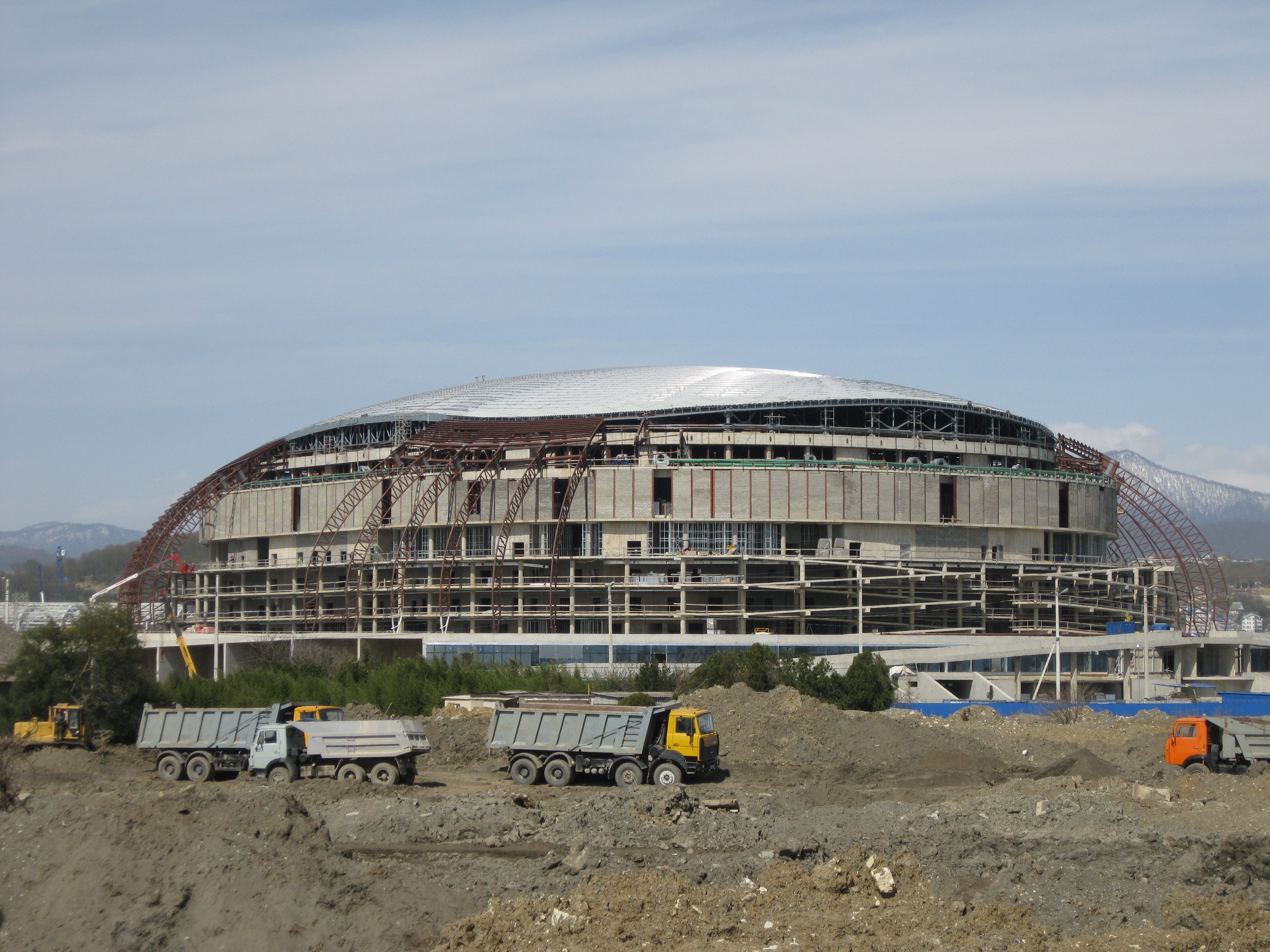 Большая ледовая арена